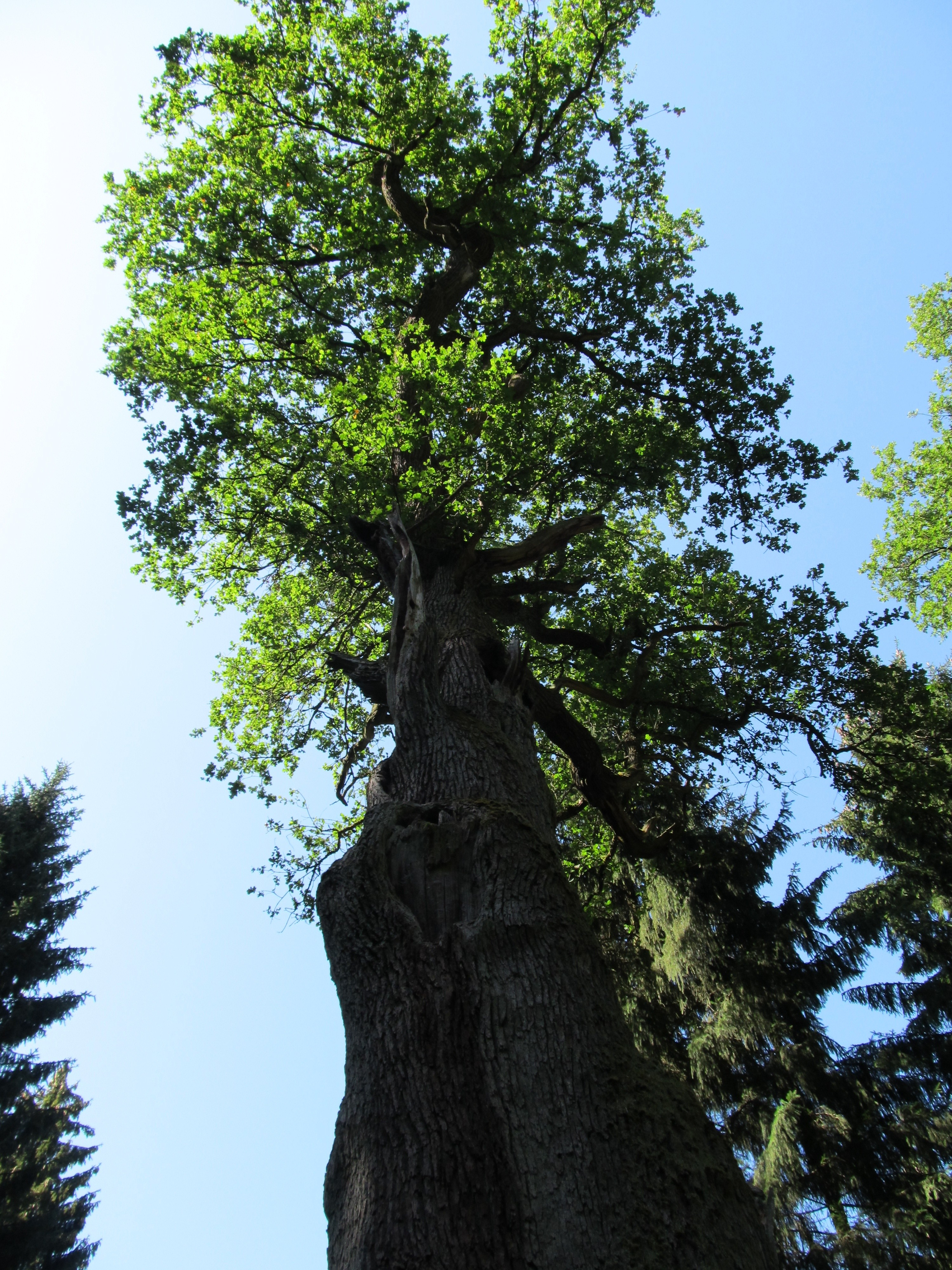 Sicht den Stamm hoch in die „Königseiche“ (oder „Schäfer-Eiche“) bei Salchendorf, Neunkirchen (Siegerland).